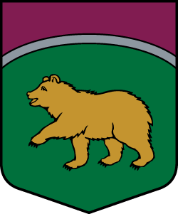 Berzaune valla vapp.